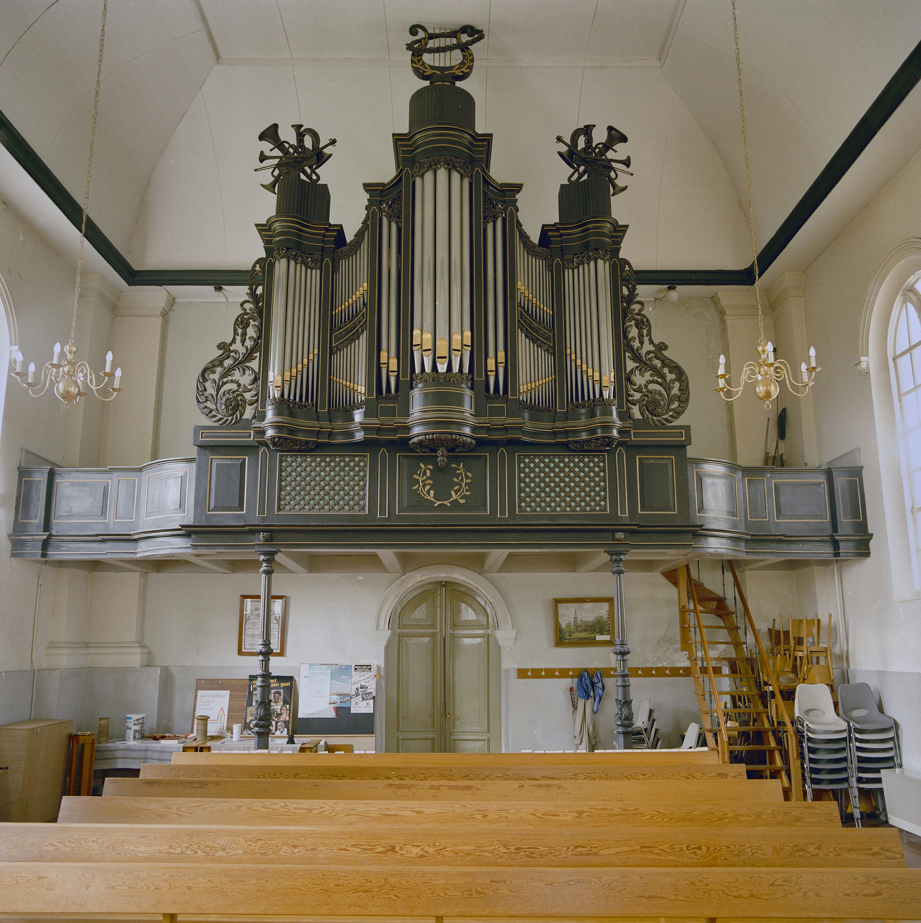 Nederlands Hervormde Kerk: INTERIEUR, ORGEL